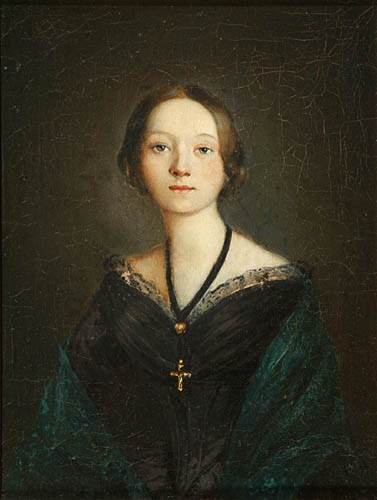 Portret Jadwigi Łuszczewskiej (Deotymy)